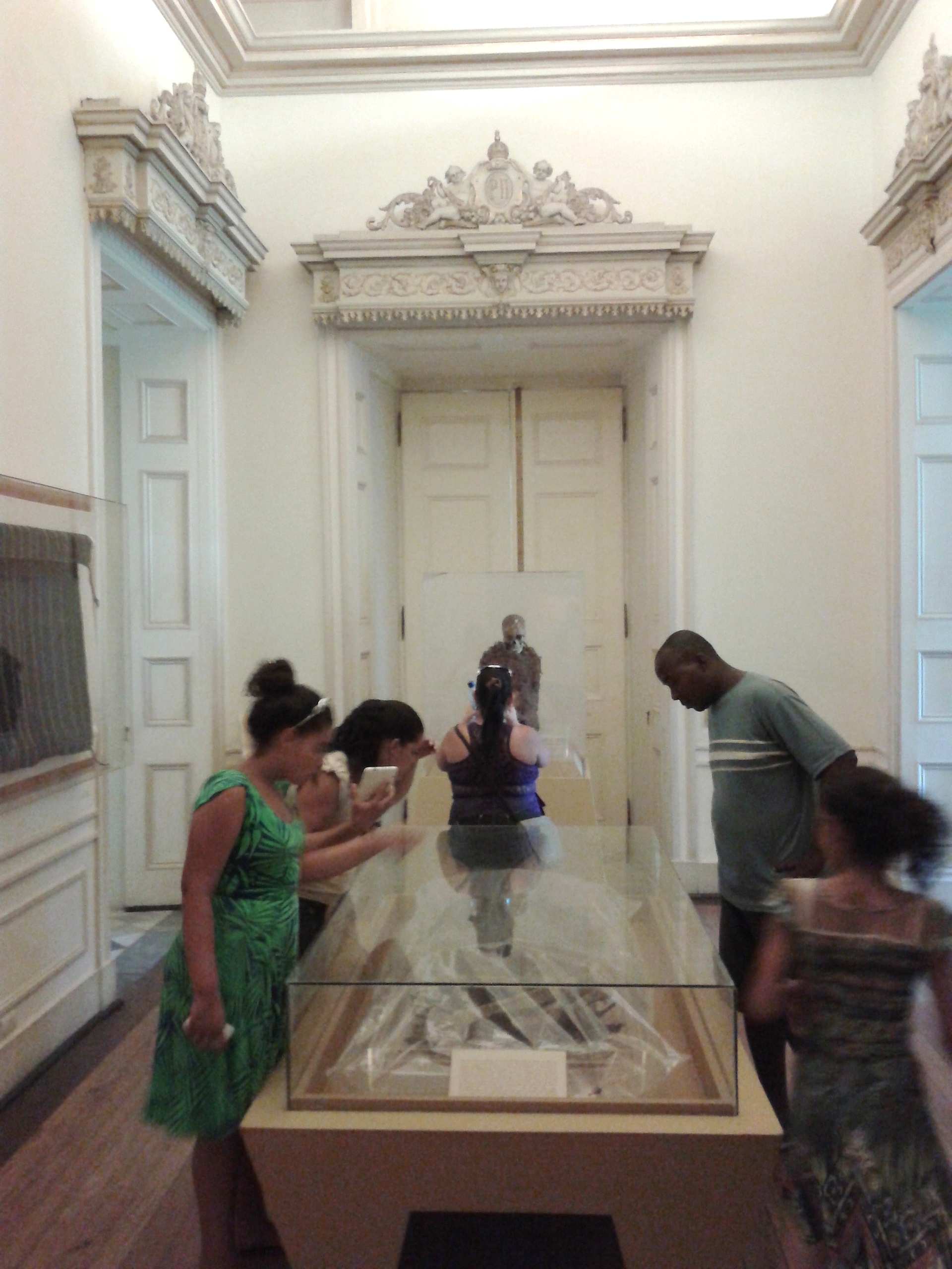 Visitantes observam múmia do acervo de arqueologia pré-colombiana do Museu Nacional/UFRJ, Rio de Janeiro.